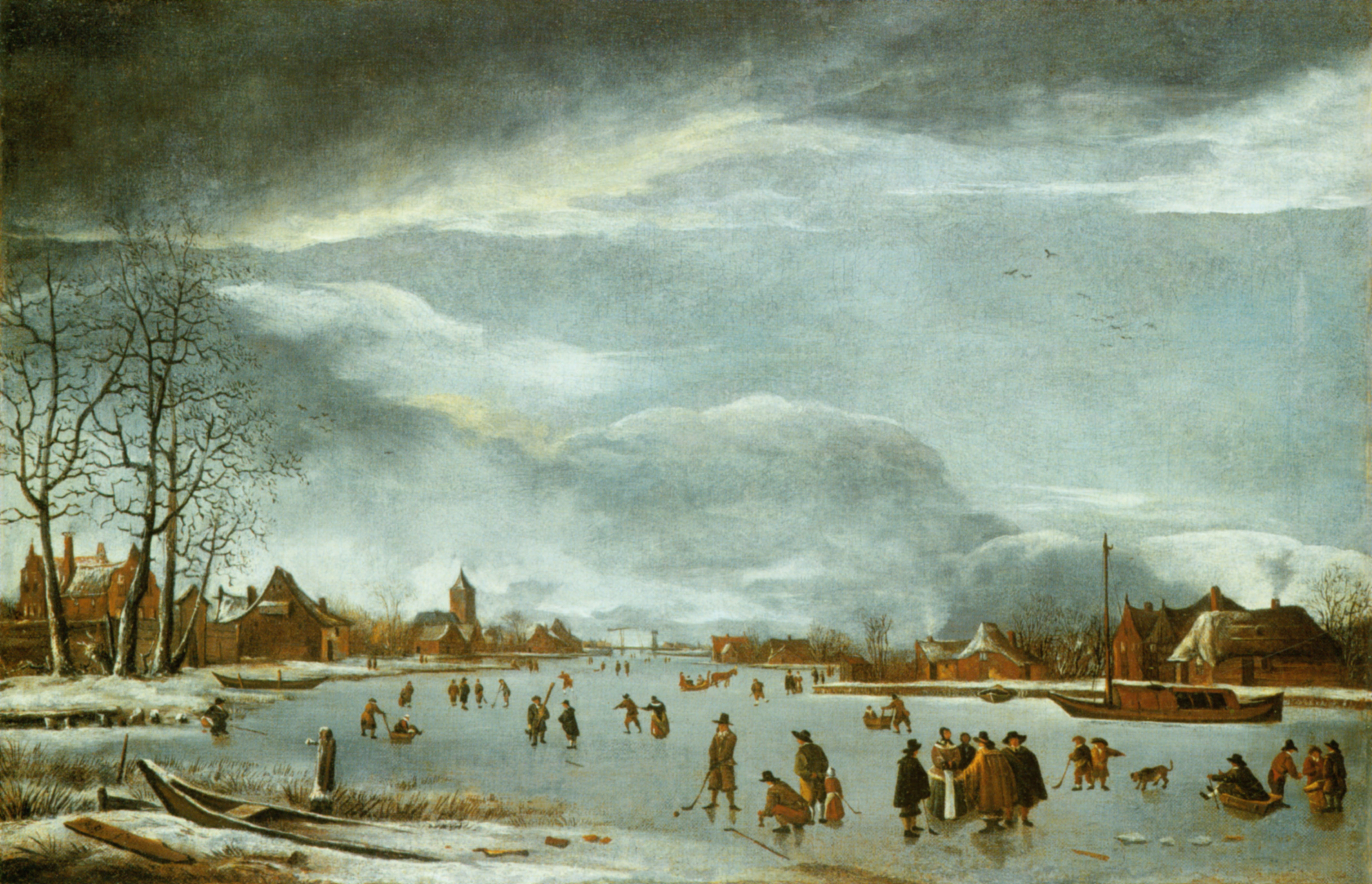 Zugefrorener Fluss mit Schlittschuhläufern und Spaziergängern